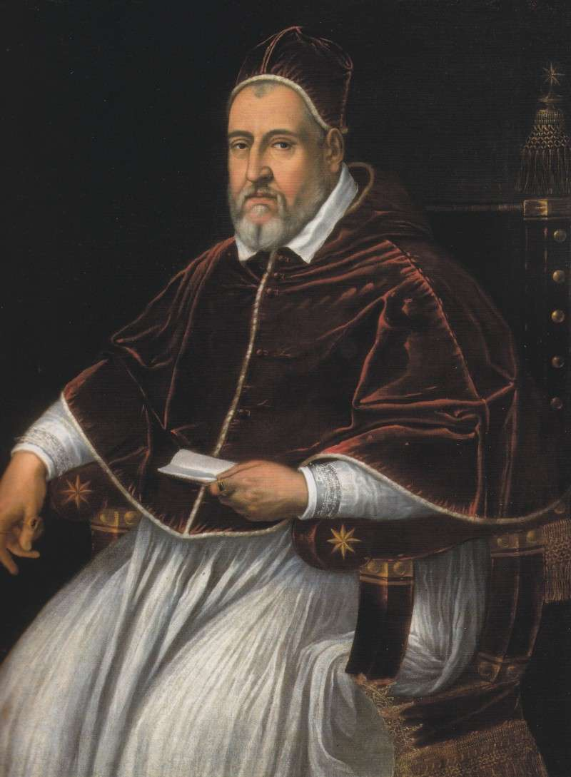 Ritratto di papa Clemente VIII (1536-1605)